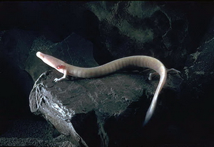 Olm (Proteus anguinus) in its natural habitat.